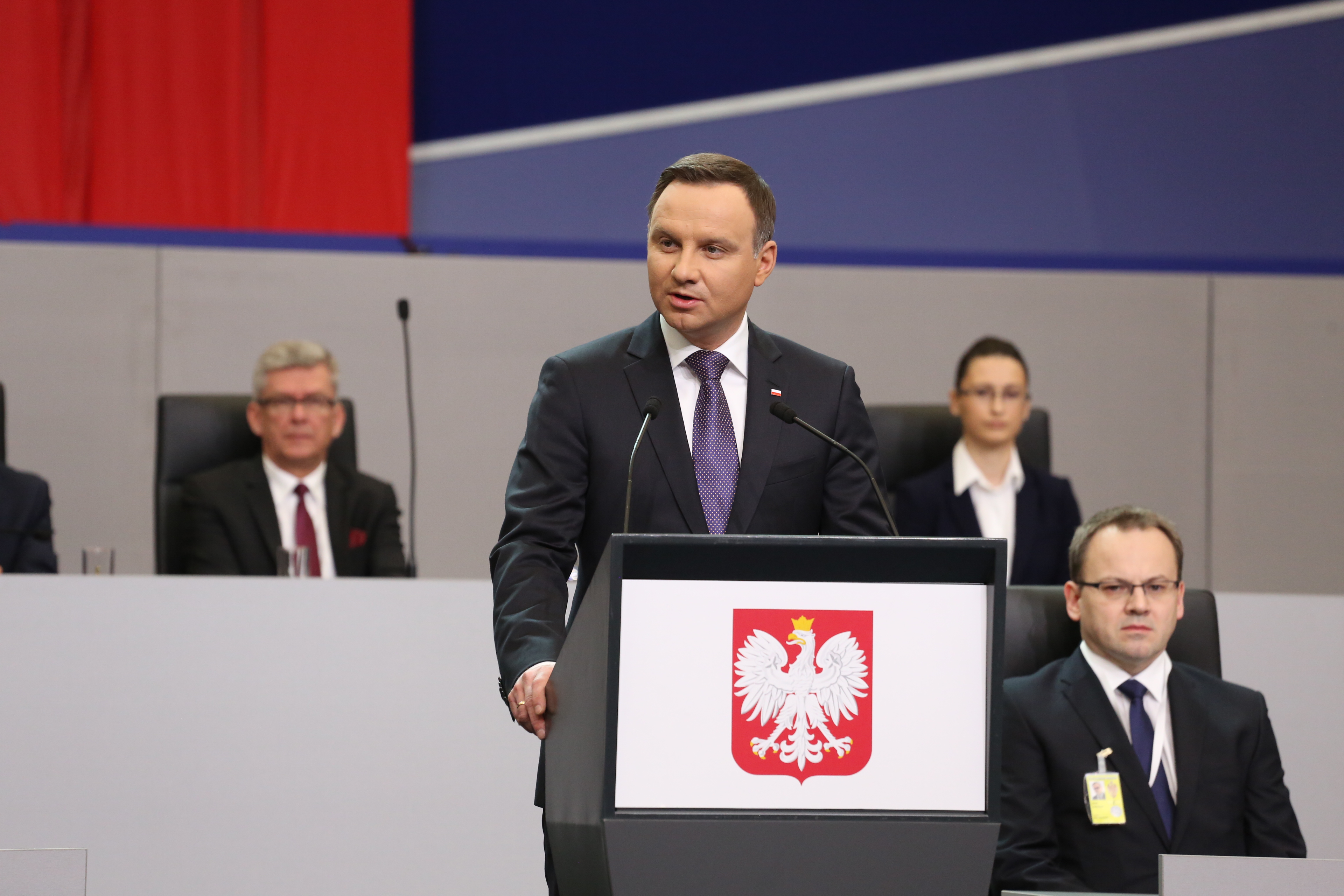 Orędzie Prezydenta RP Andrzeja Dudy podczas Zgromadzenia Narodowego w Poznaniu z okazji 1050. rocznicy chrztu Polski.